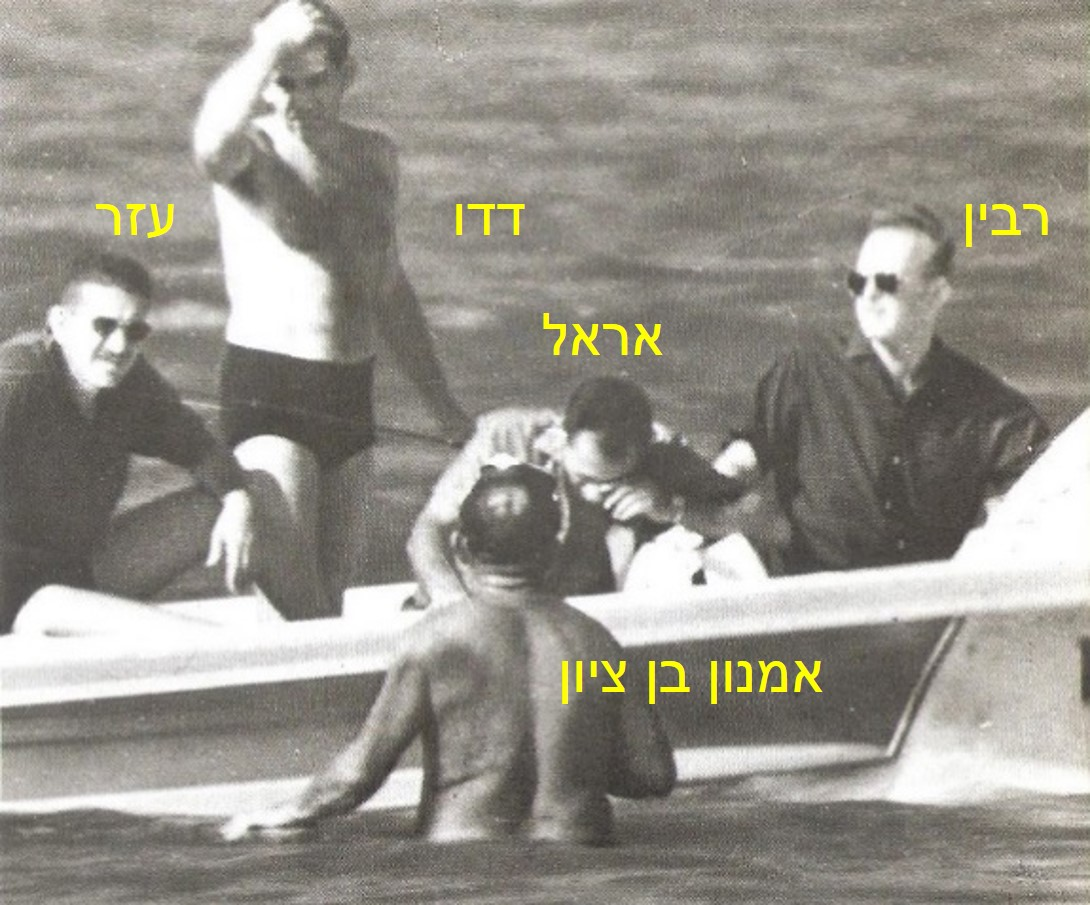 פיקוד צה"ל בסירה בקרבת בחוף הסורי ומקבל הסבר מקצין שייטת 13 המאבטח את סירת המשמר התקועה. מימין לשמאל יצחק רבין שלמה אראל, עומד דוד אלעזר ועזר וייצמן. מהגב אמנון בן ציון. אוגוסט 1966